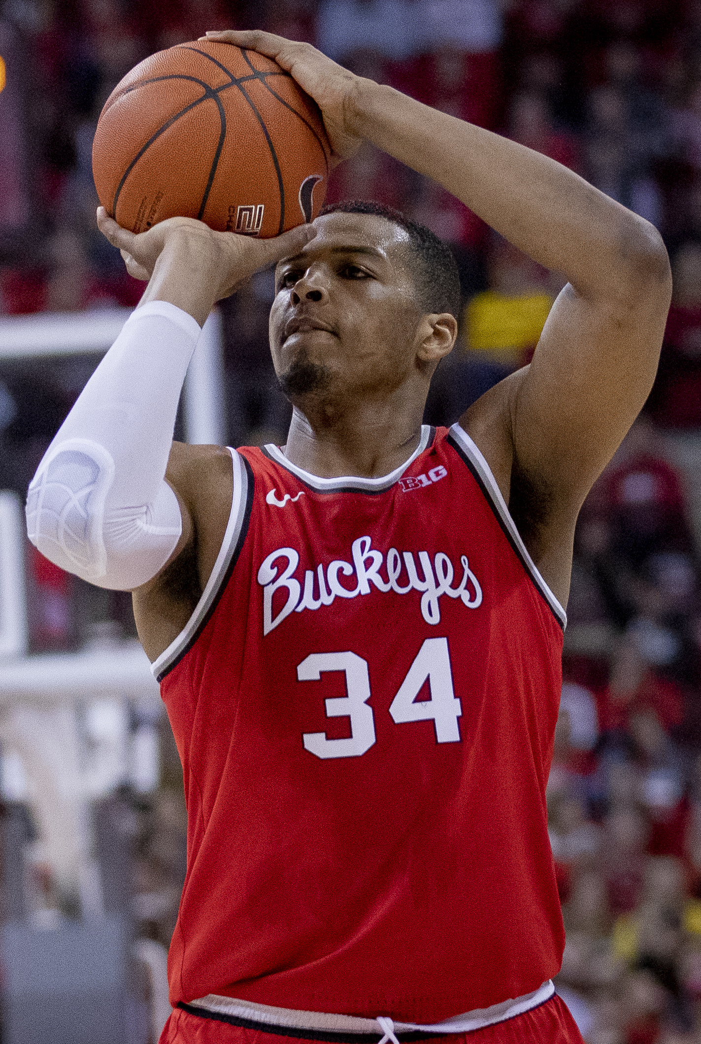 4O6A9869